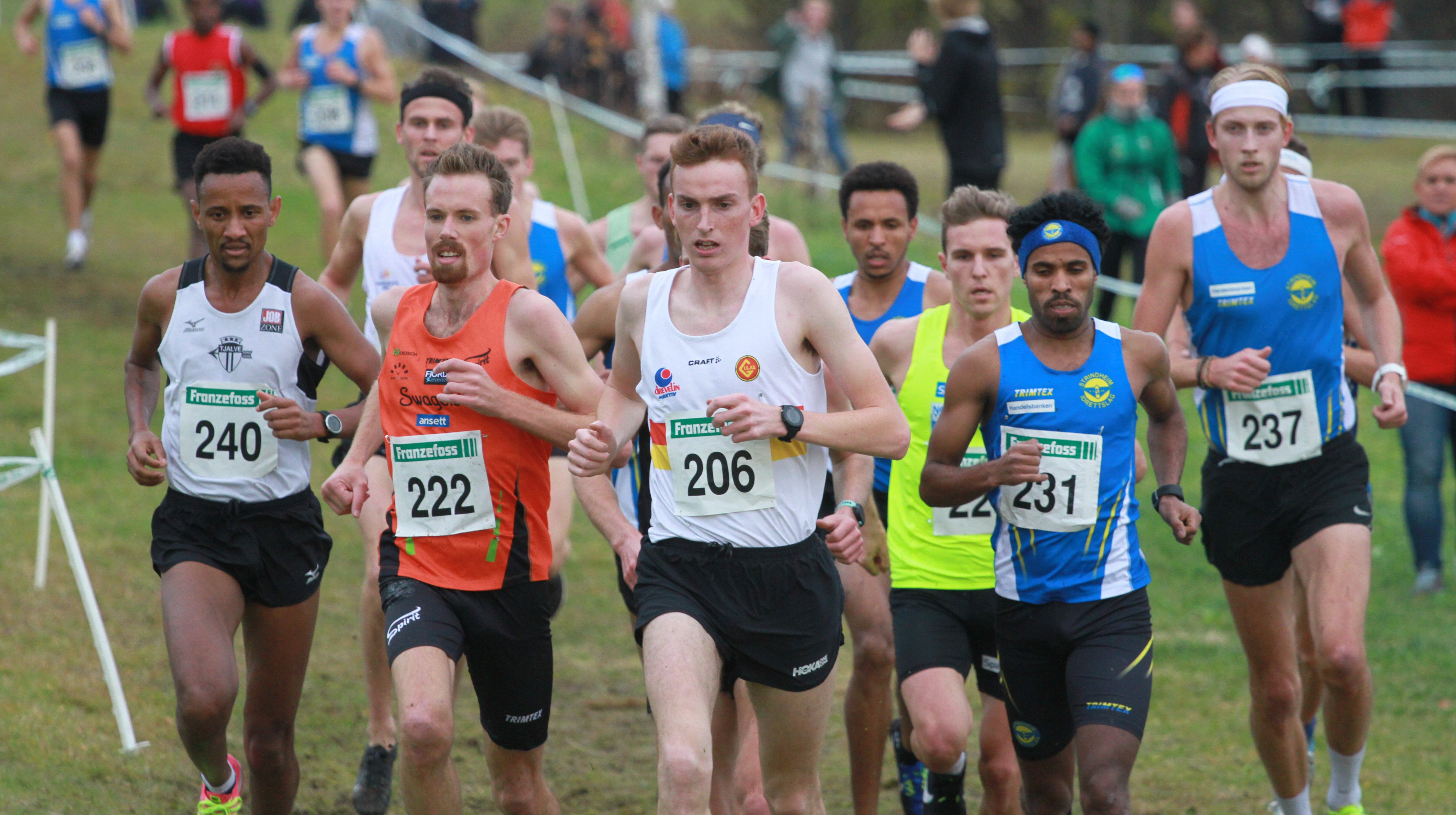 NM i terrengløp, lang løype, Bratsberg - Trondheim, 2018. Fra herrenes løp. Fra venstre Senay Fissehatsion (240), Ørjan Grønnevig (222), Marius Vedvik (206), Didrik Tønseth (bak, 228), Haben Brhane Gebrehiwet (231) og Trond Einar Moen Pedersli (237).